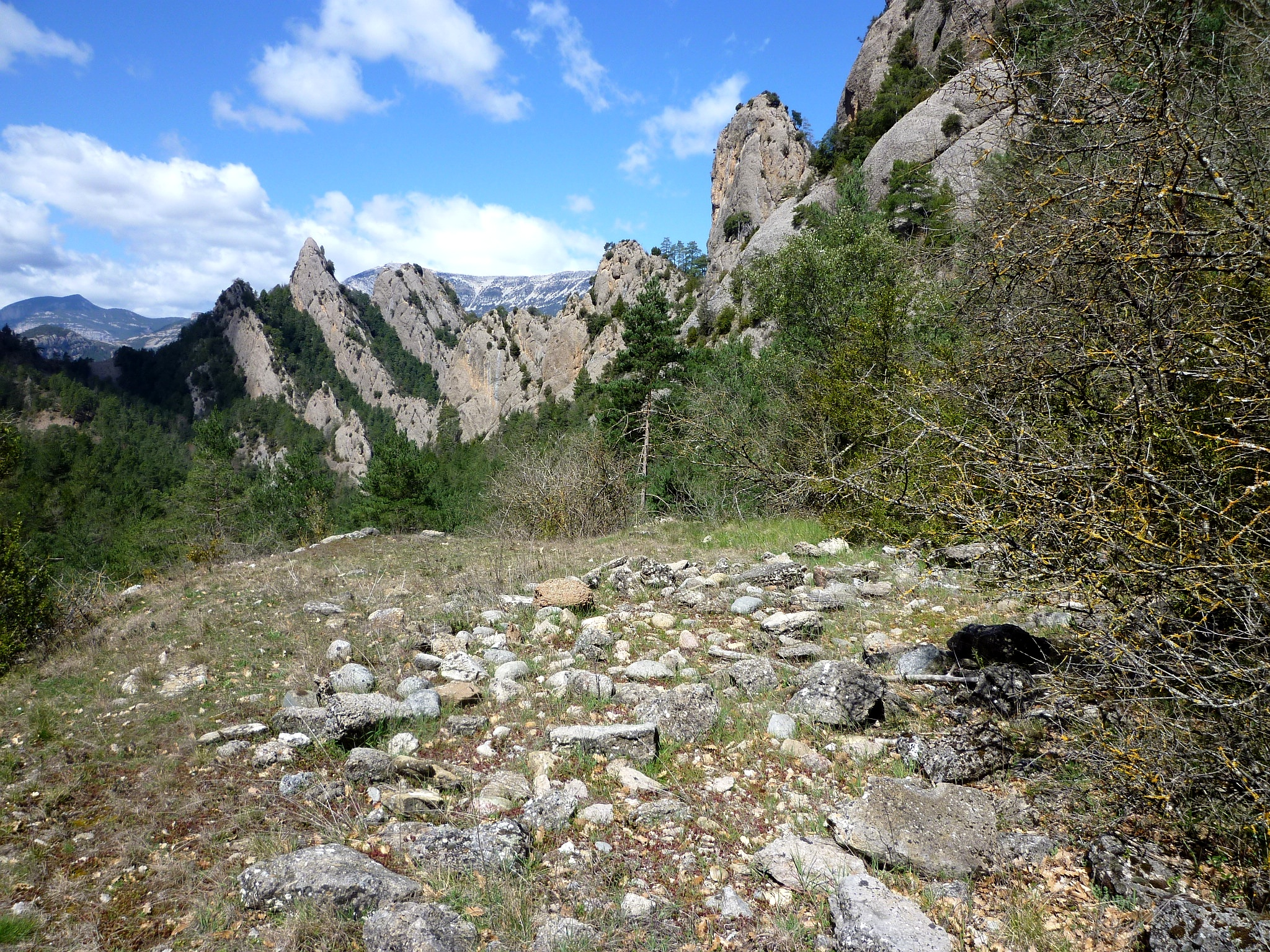 Espai deixat per les runes de la masia dels Llengots, a la Serra dels Bastets, de Guixers (Solsonès - Catalunya)